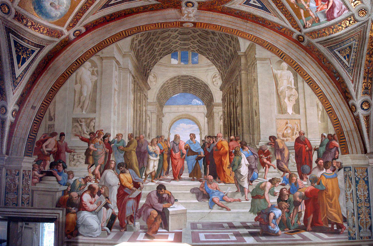 A Escola de Atenas, afresco no Vaticano